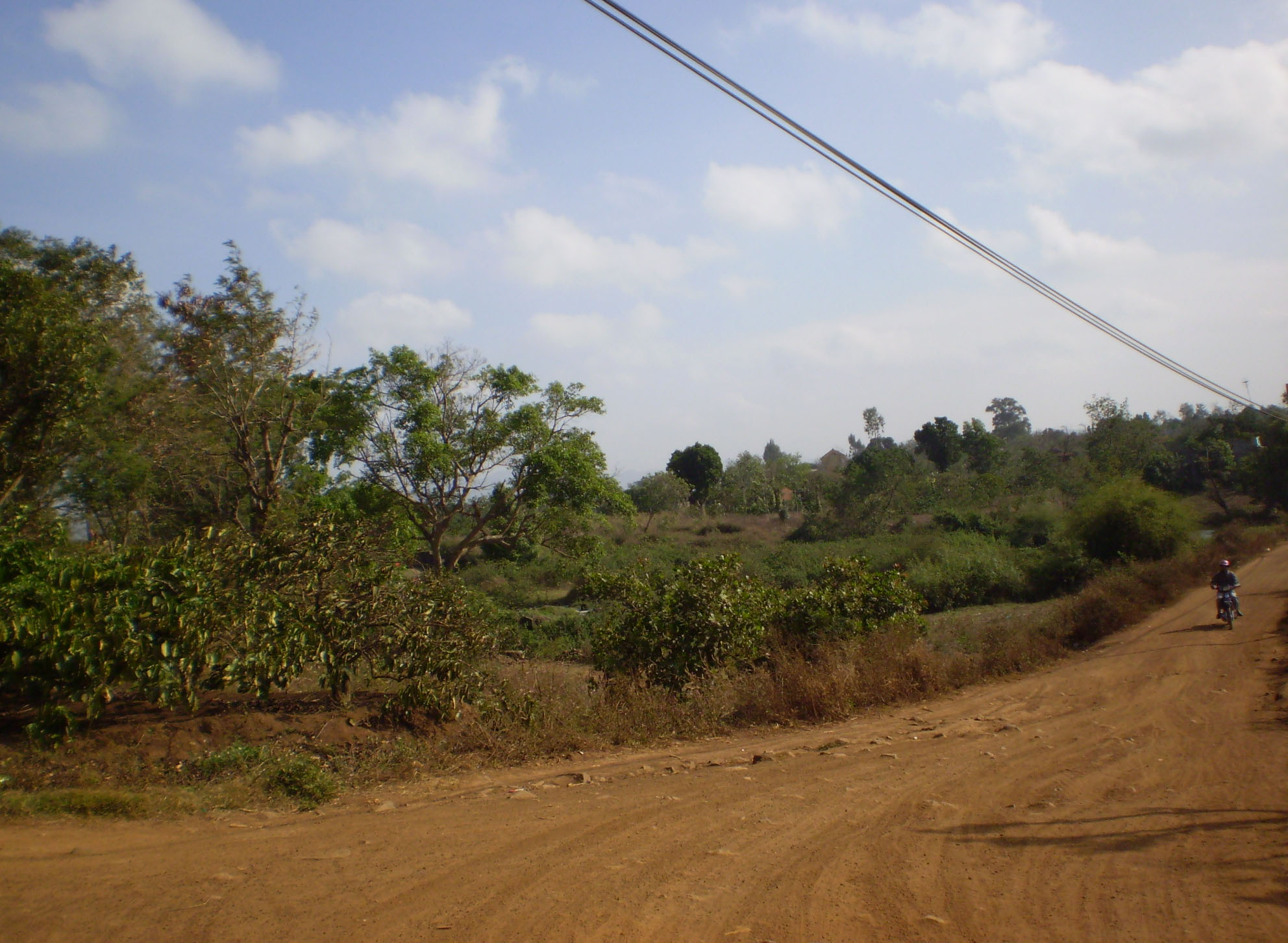 Con đường dẫn vào xã Ea Hu chưa được trải nhựa